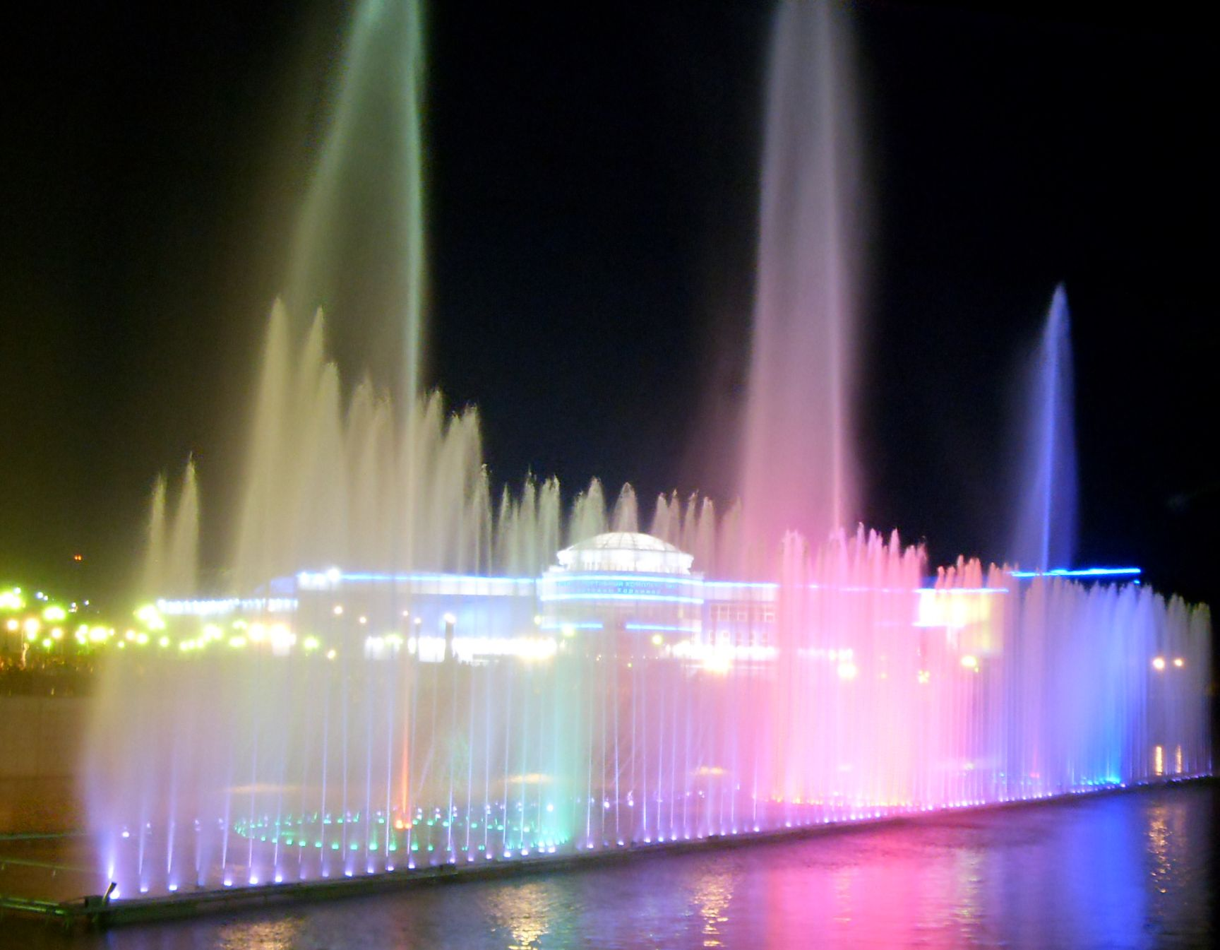 Плавающий фонтан на реке Везелка возле Белгородского государственного университета